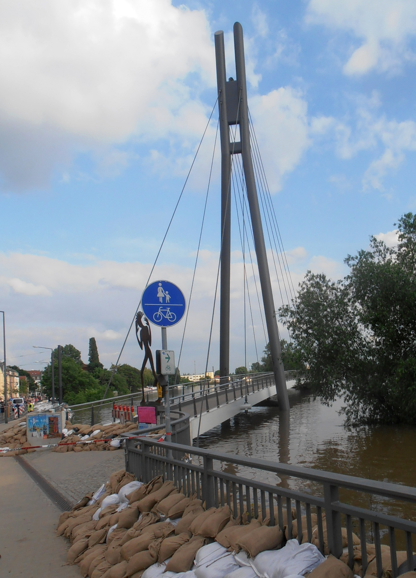 Die Molenbrücke in Dresden-Pieschen während des Hochwassers in Mitteleuropa 2013; Blick von Norden